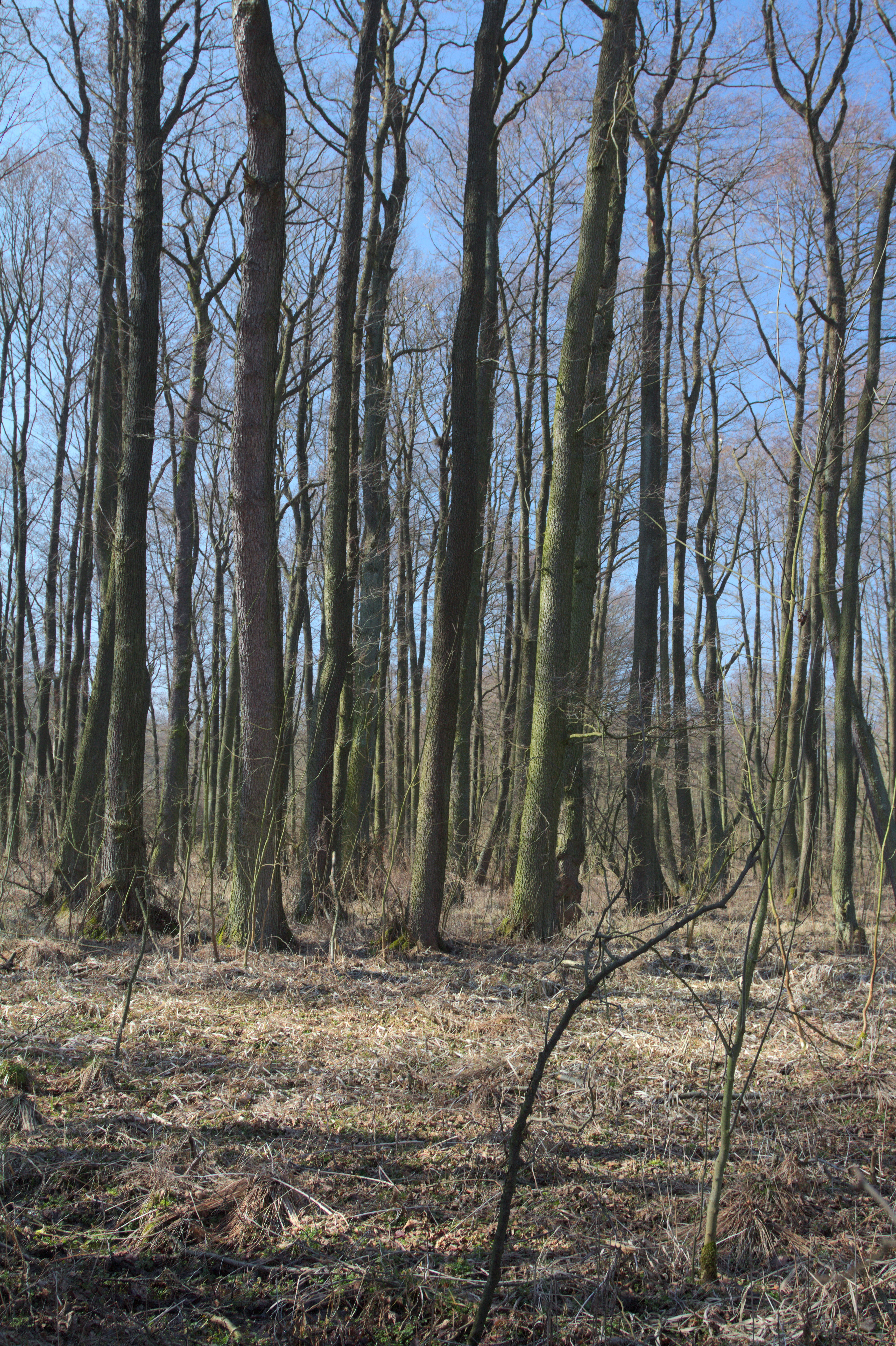 Kysibl (přírodní památka) - brzké jaro